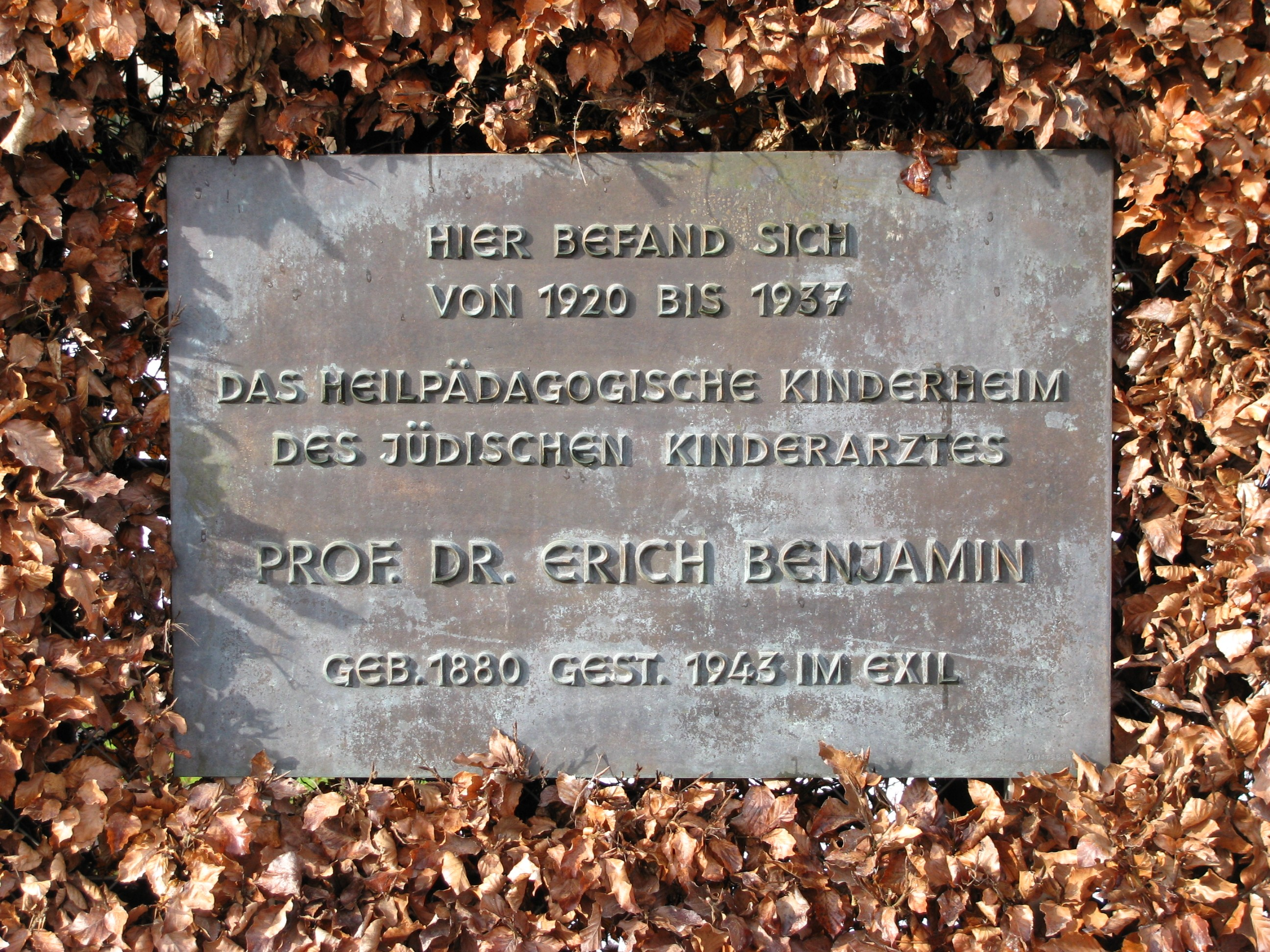 Gedenktafel am ehem. Kindersanatorium in Zell, Gemeinde Schäftlarn